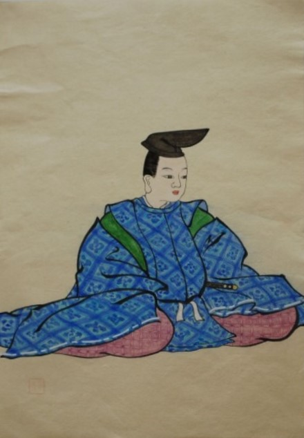 津軽信興の肖像。